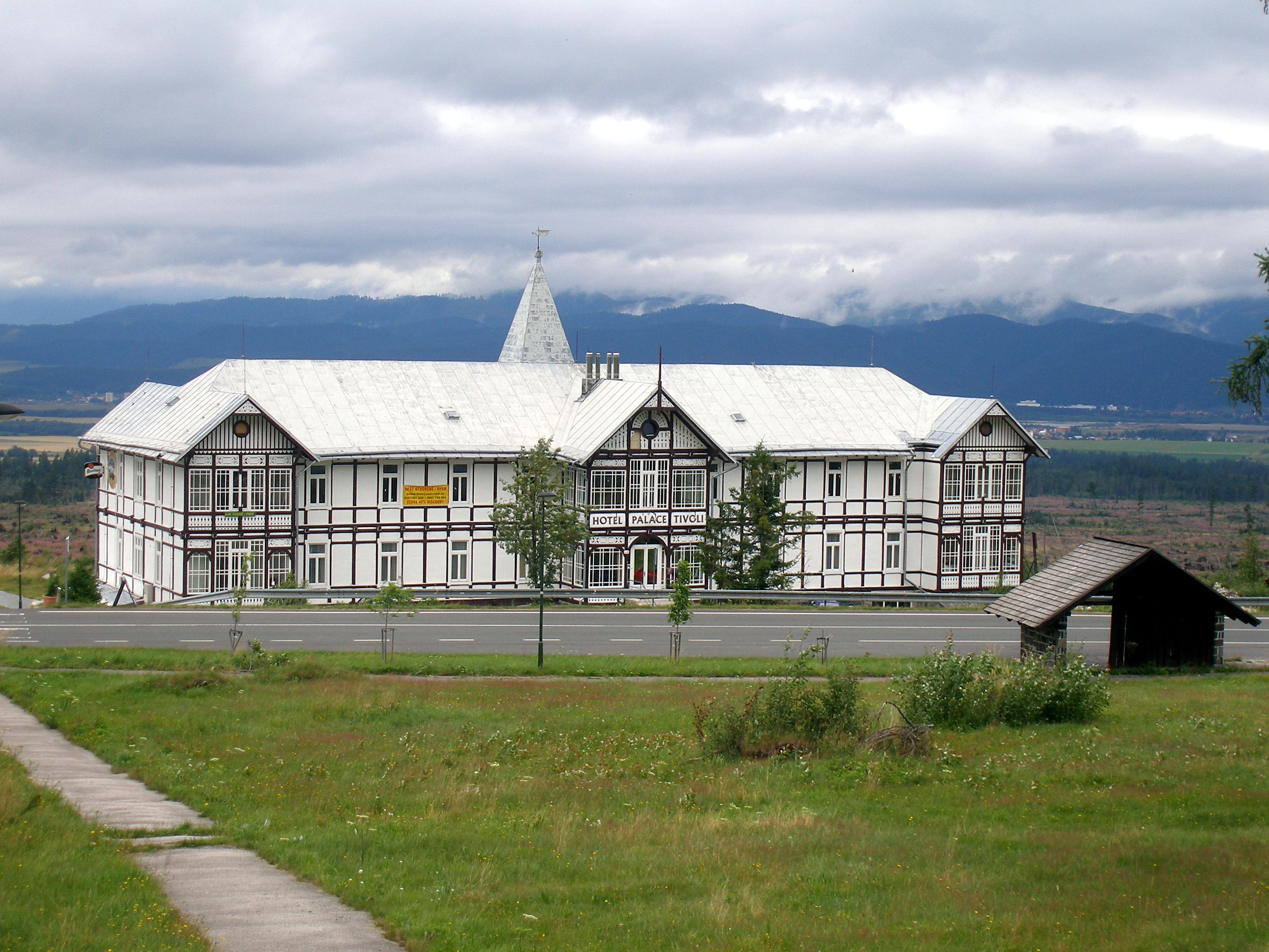 Tatranská Polianka osada vo Vysokých Tatrách Hotel Palace Tivoli This medium shows the protected monument with the number 706-3869/0 (other) in the Slovak Republic.